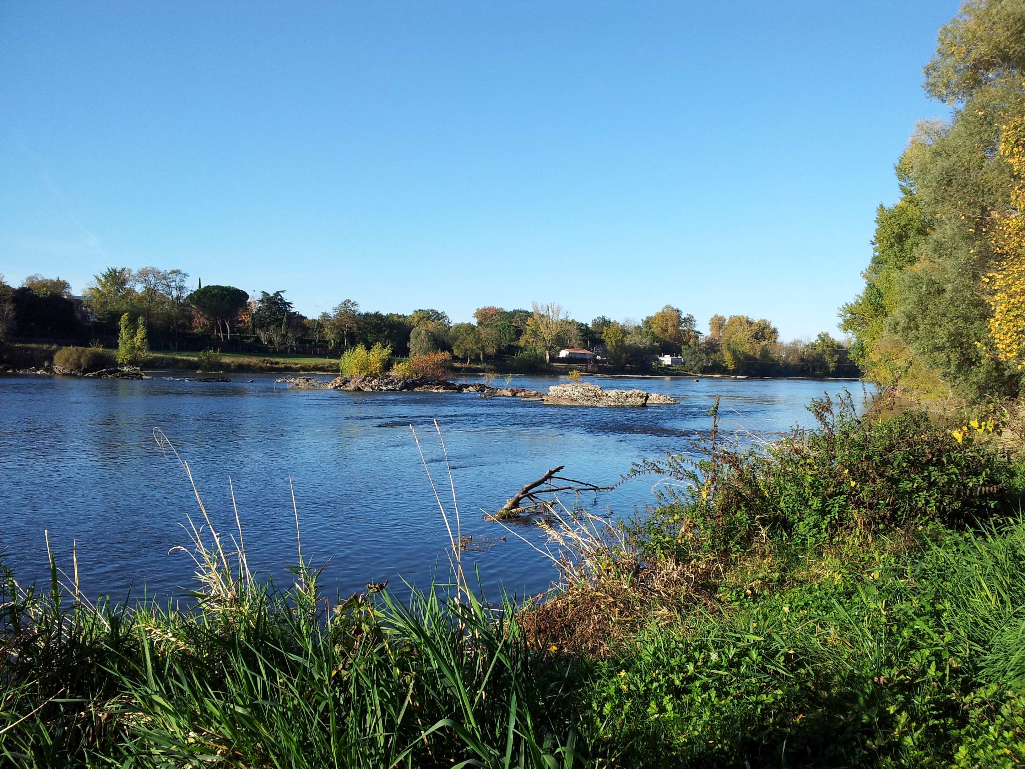 La Garonne au début de l'automne au sud de Toulouse